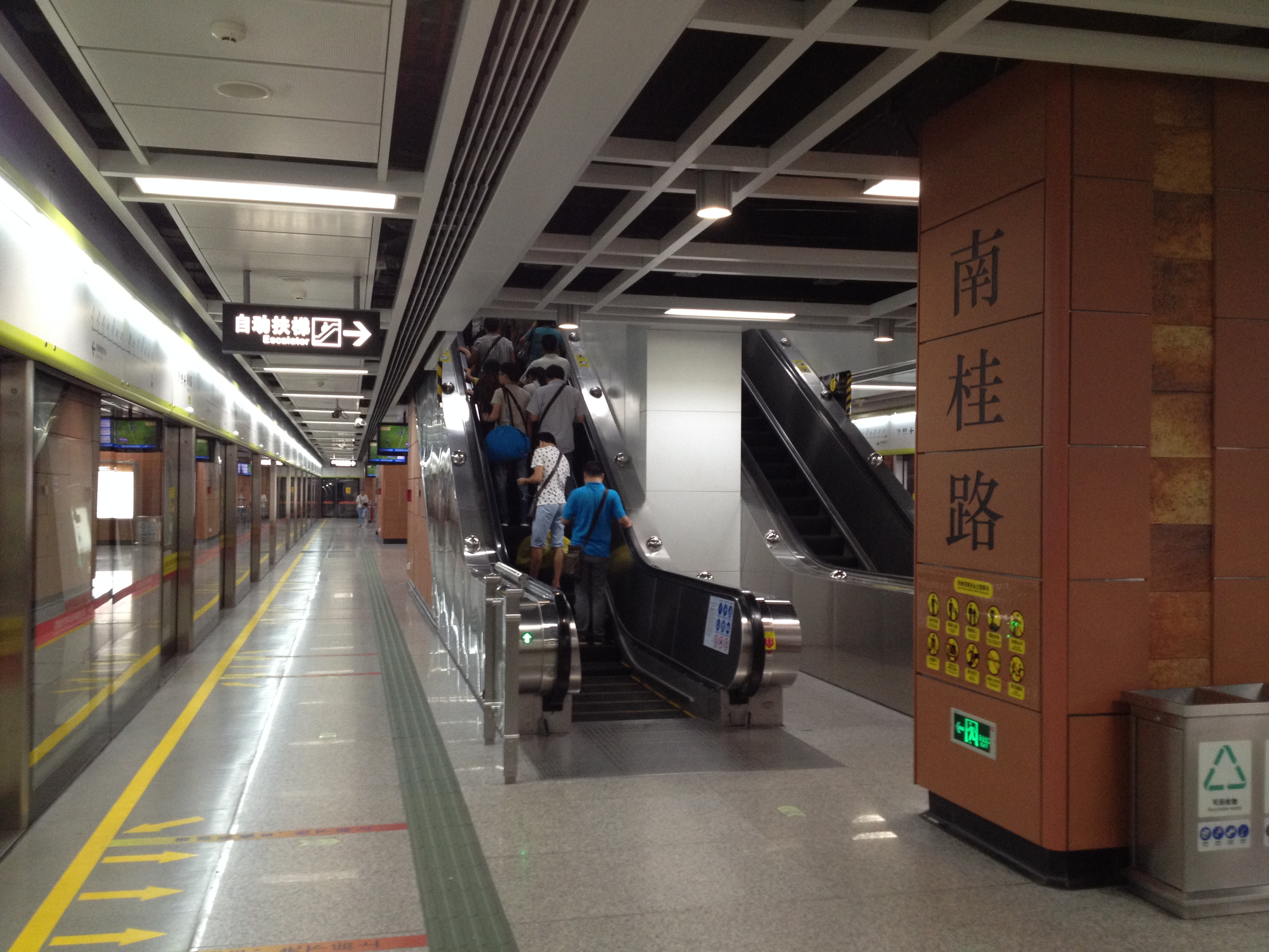 广佛地铁南桂路站月台（魁奇路方向）